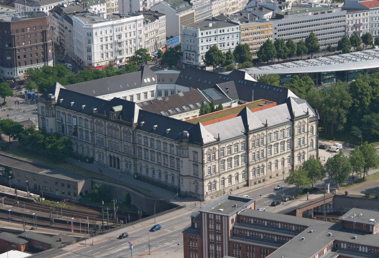 Museum für Kunst und Gewerbe in Hamburg vom Highflyer